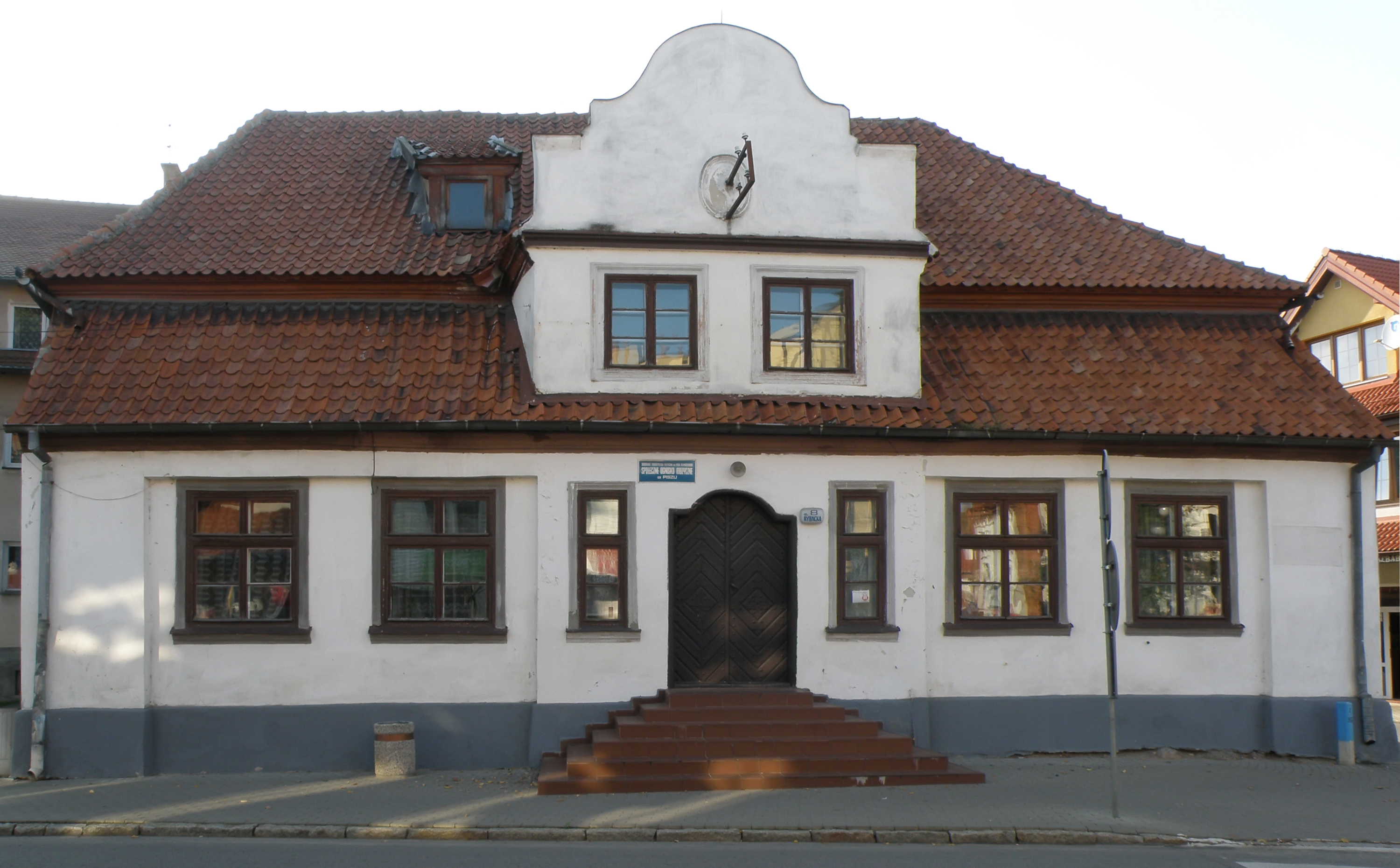 Pisz, ul. Rybacka 8 - Dom Królewski, XVIII w. (zabytek nr A-122 z 28.09.1953)